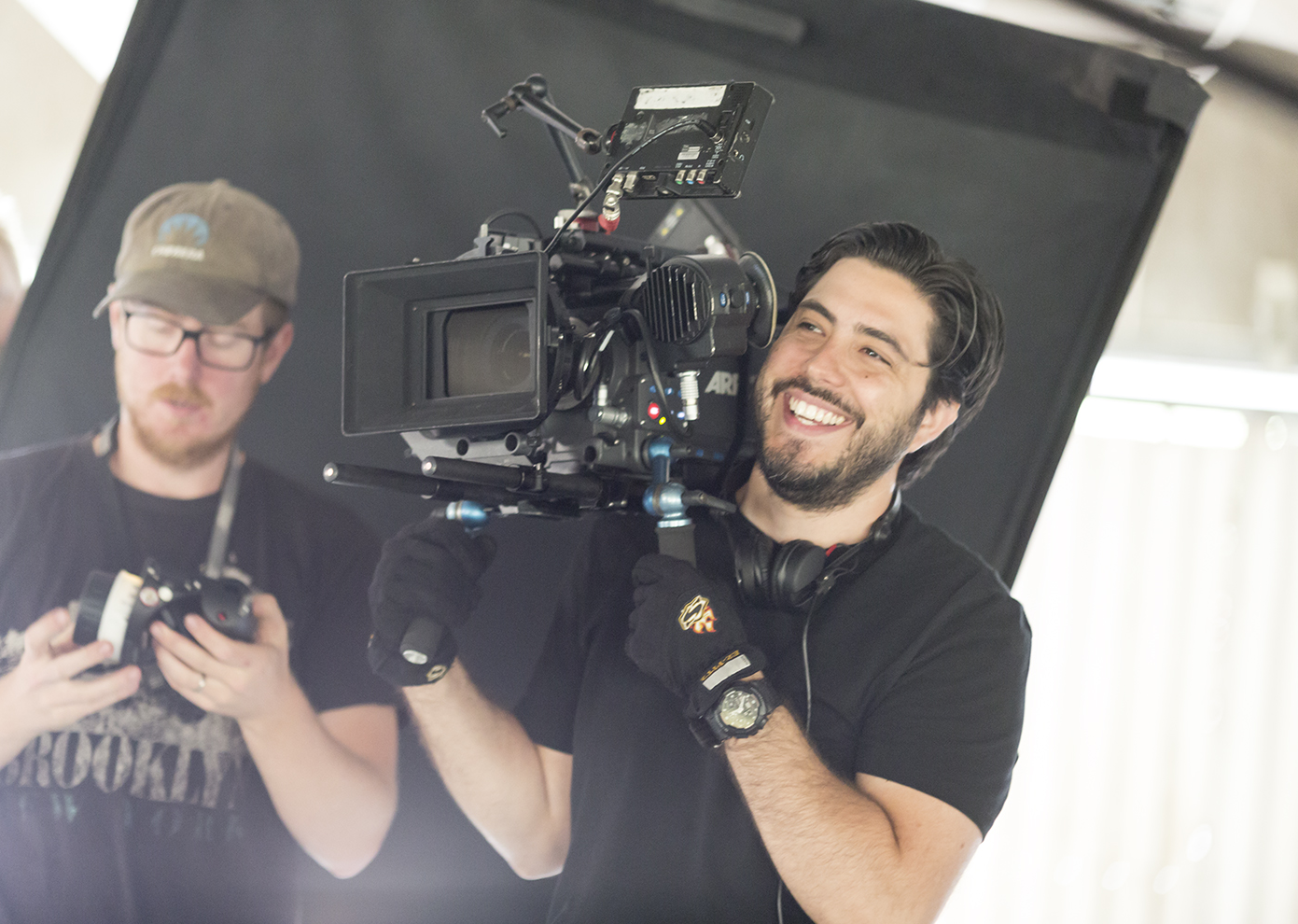 Manuel Concha Foto: Caroline Romare